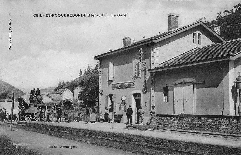 Photo de la gare au début des années 1900.